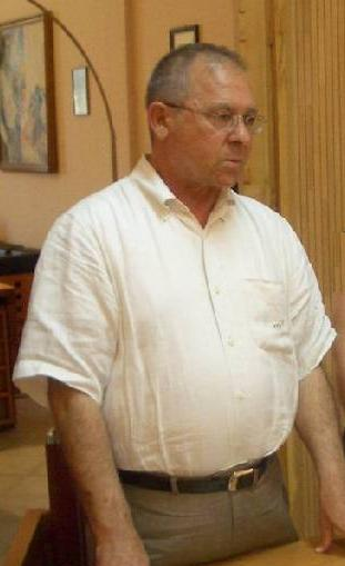 Foto van Calogero Guelli, de burgemeester van Sicilië, ik heb de foto gemaakt en verleen wikipedia toestemming het te gebruiken.